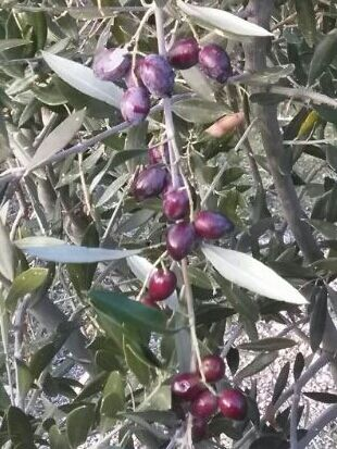 Aceitunas maduras de la variedad koroneiki